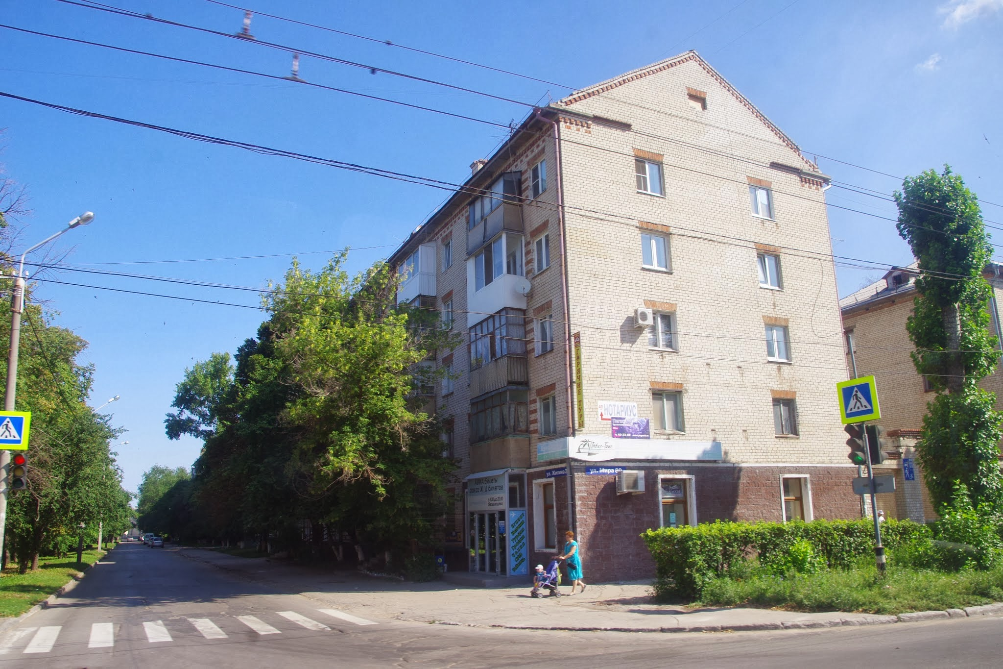 Tsentralnyy rayon, Tolyatti, Samarskaya oblast', Russia